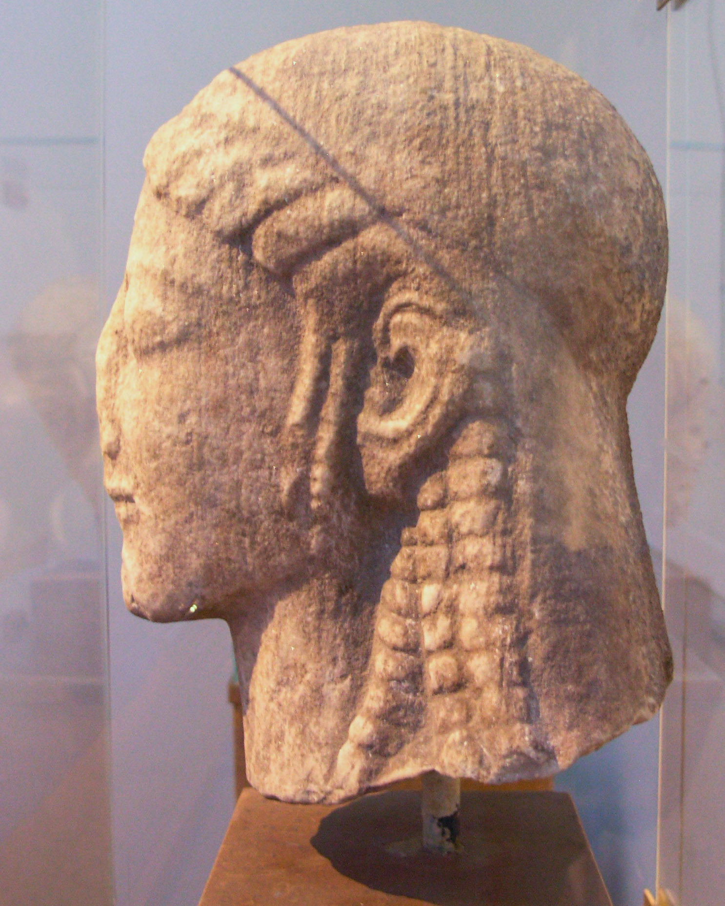 Tête d'un kouros en marbre, trouvé au sanctuaire d'Apollon Ptoos en Béotie. Vers 540 av. J.-C.